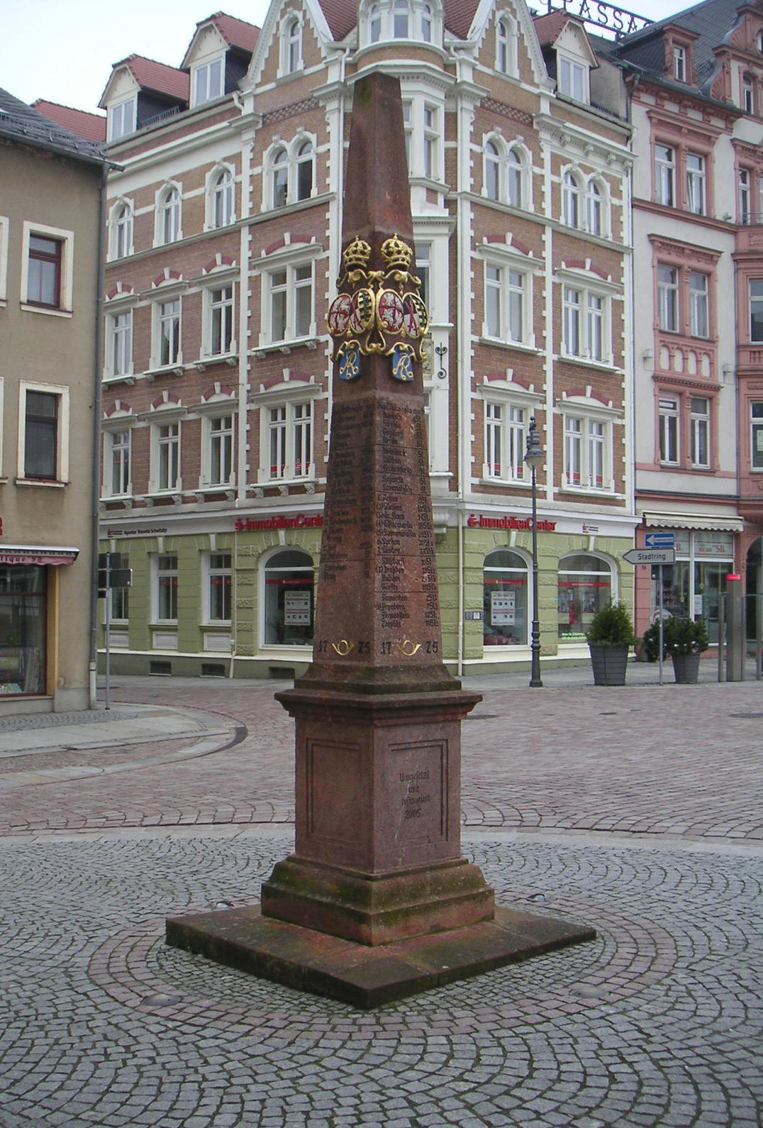 Kursächsische Distanzsäule (rekonstruiert) von 1725 in Mittweida